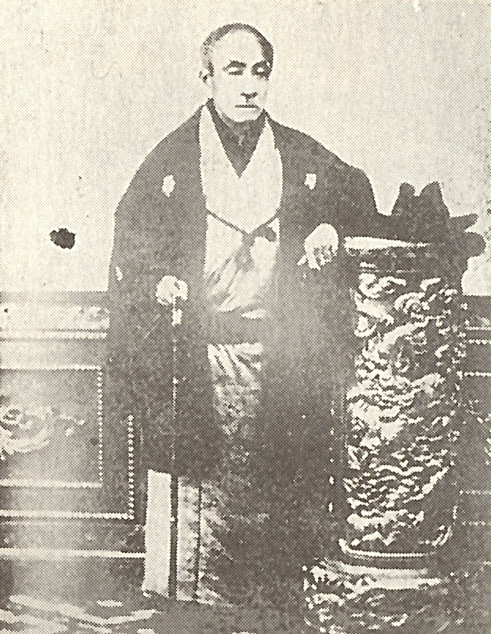 伊東祐相の肖像写真。